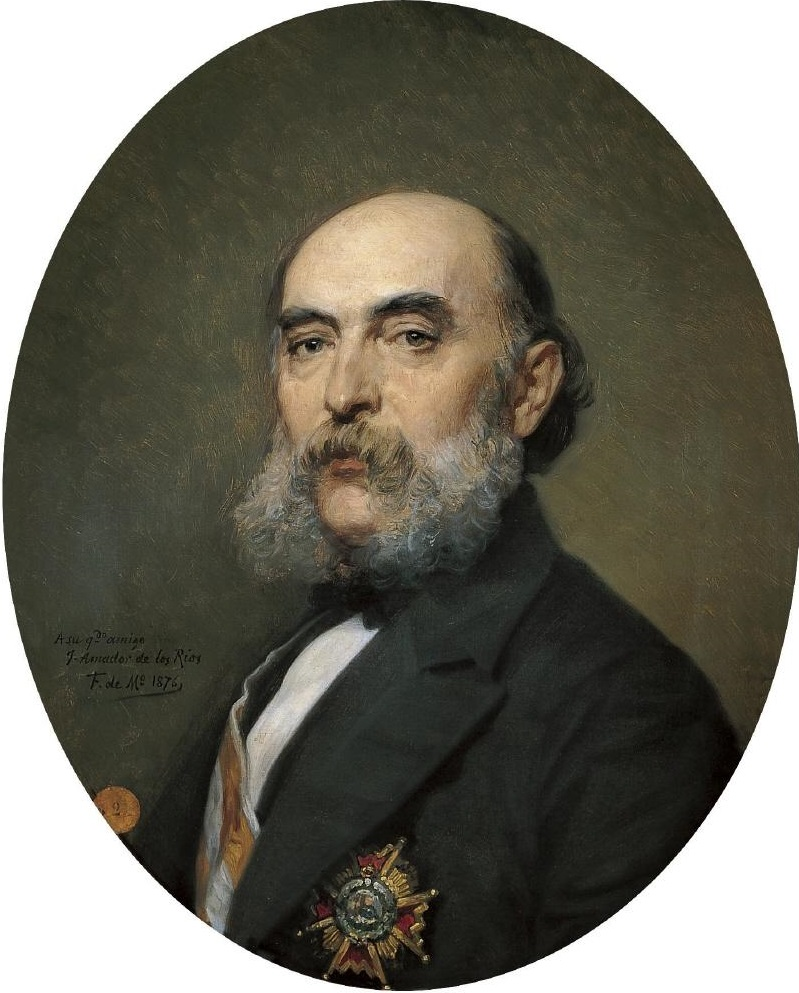 Retrato del historiador, crítico literario y arqueólogo español José Amador de los Ríos (1818-1878).